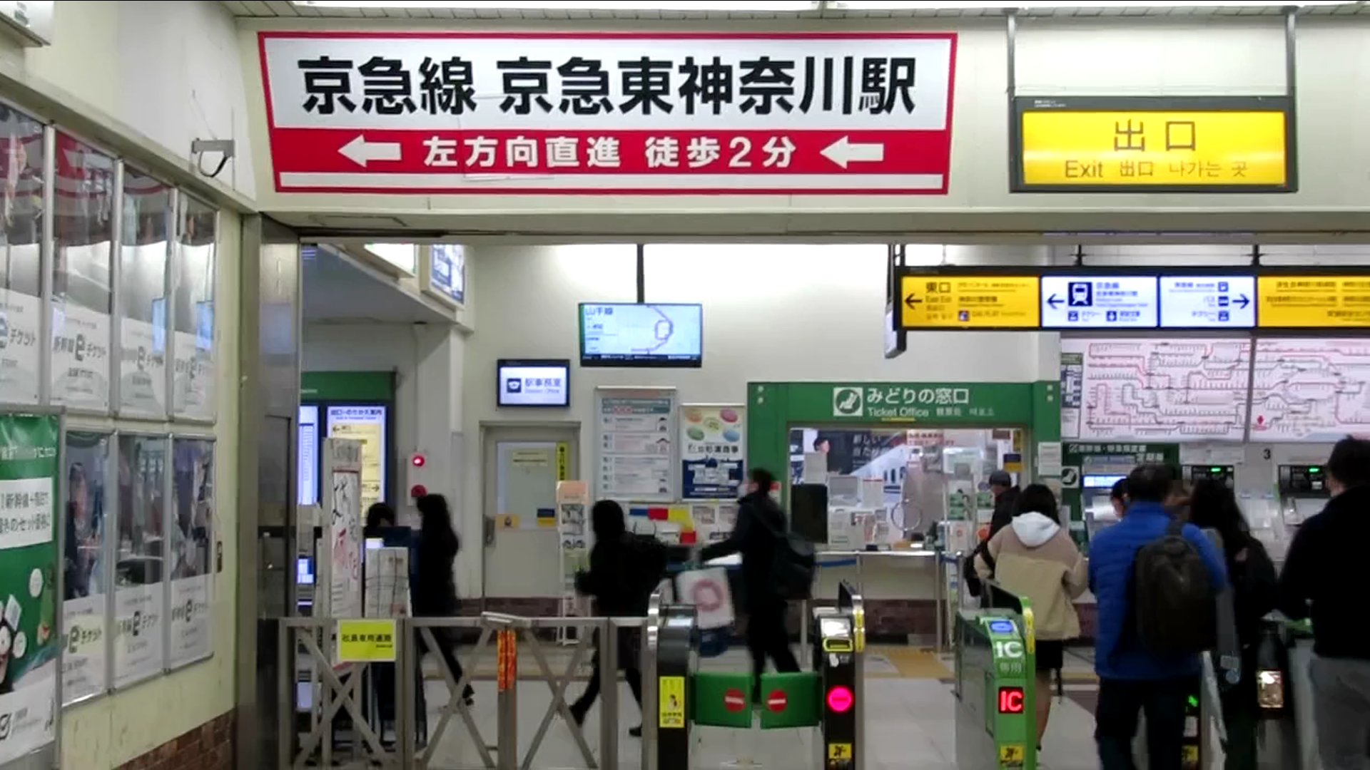 東神奈川駅からの乗り換え